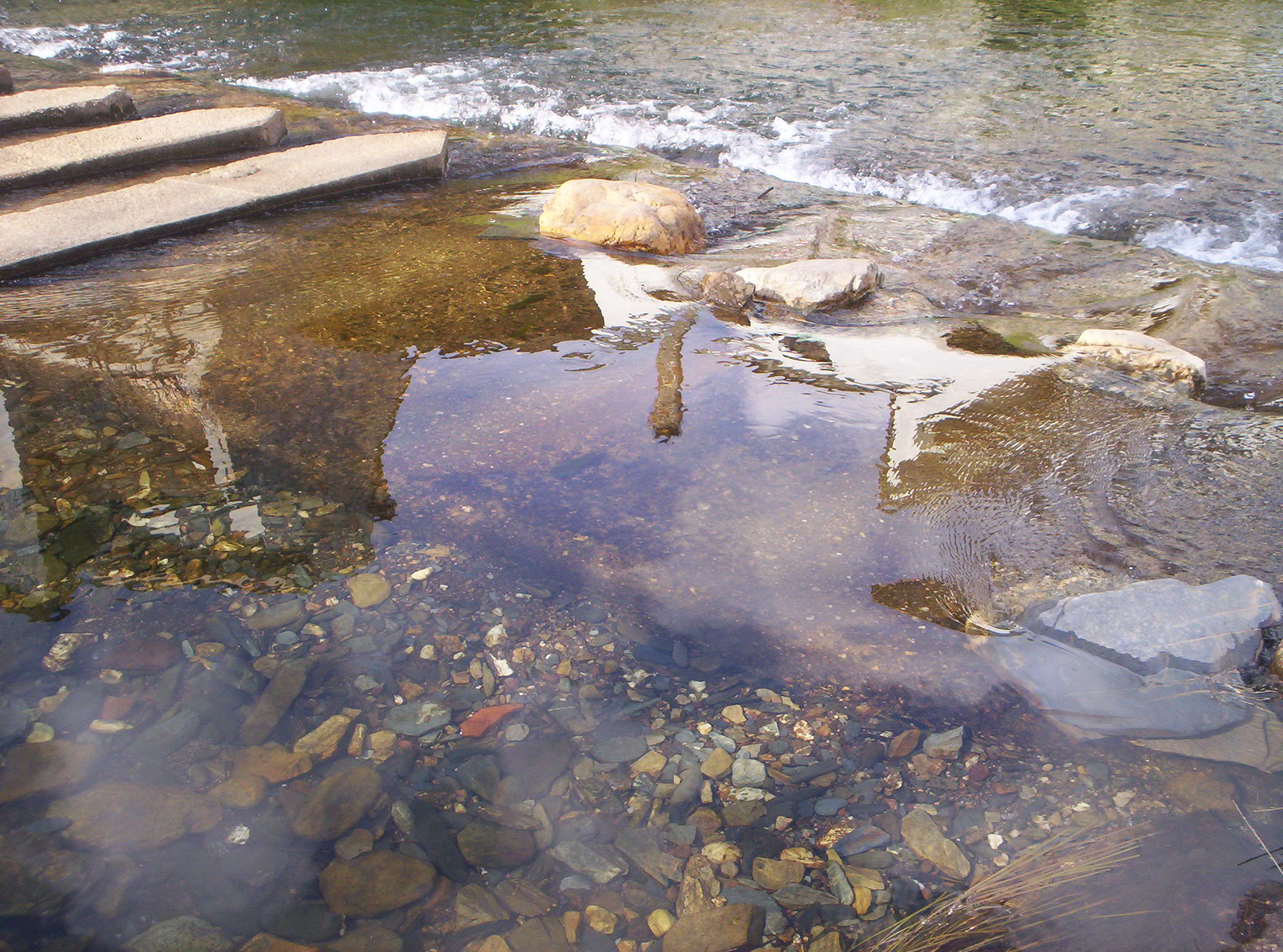 Rihonor de Castilla, Zamora, Spain